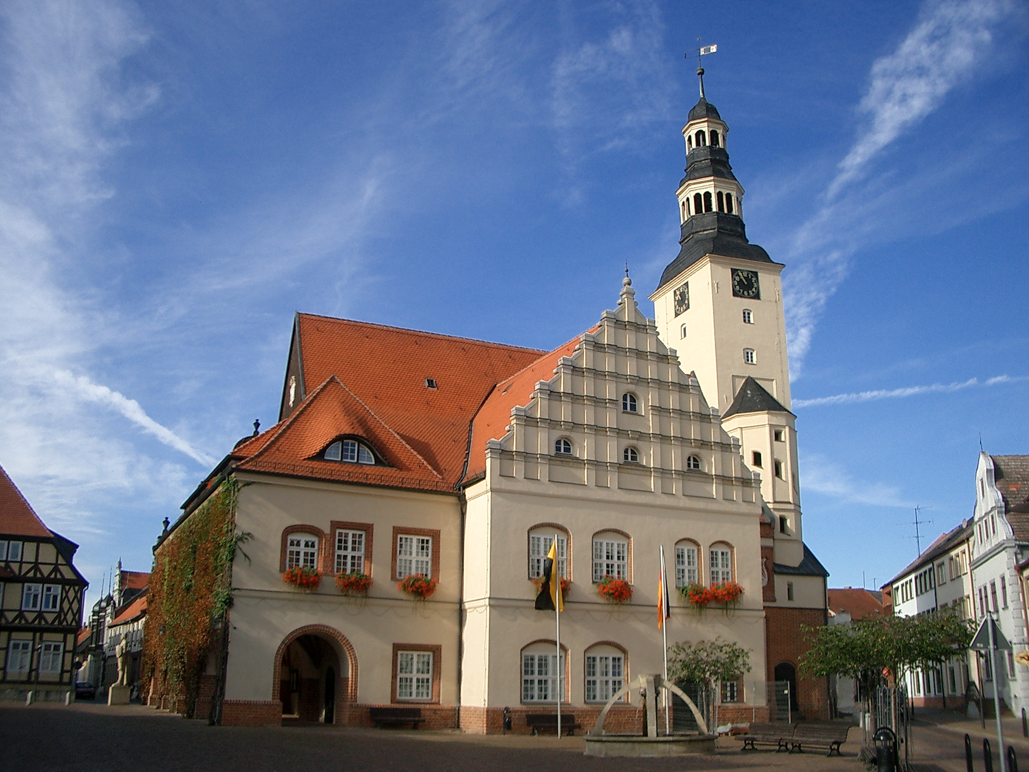 Rathaus und Marktplatz in Gardelegen